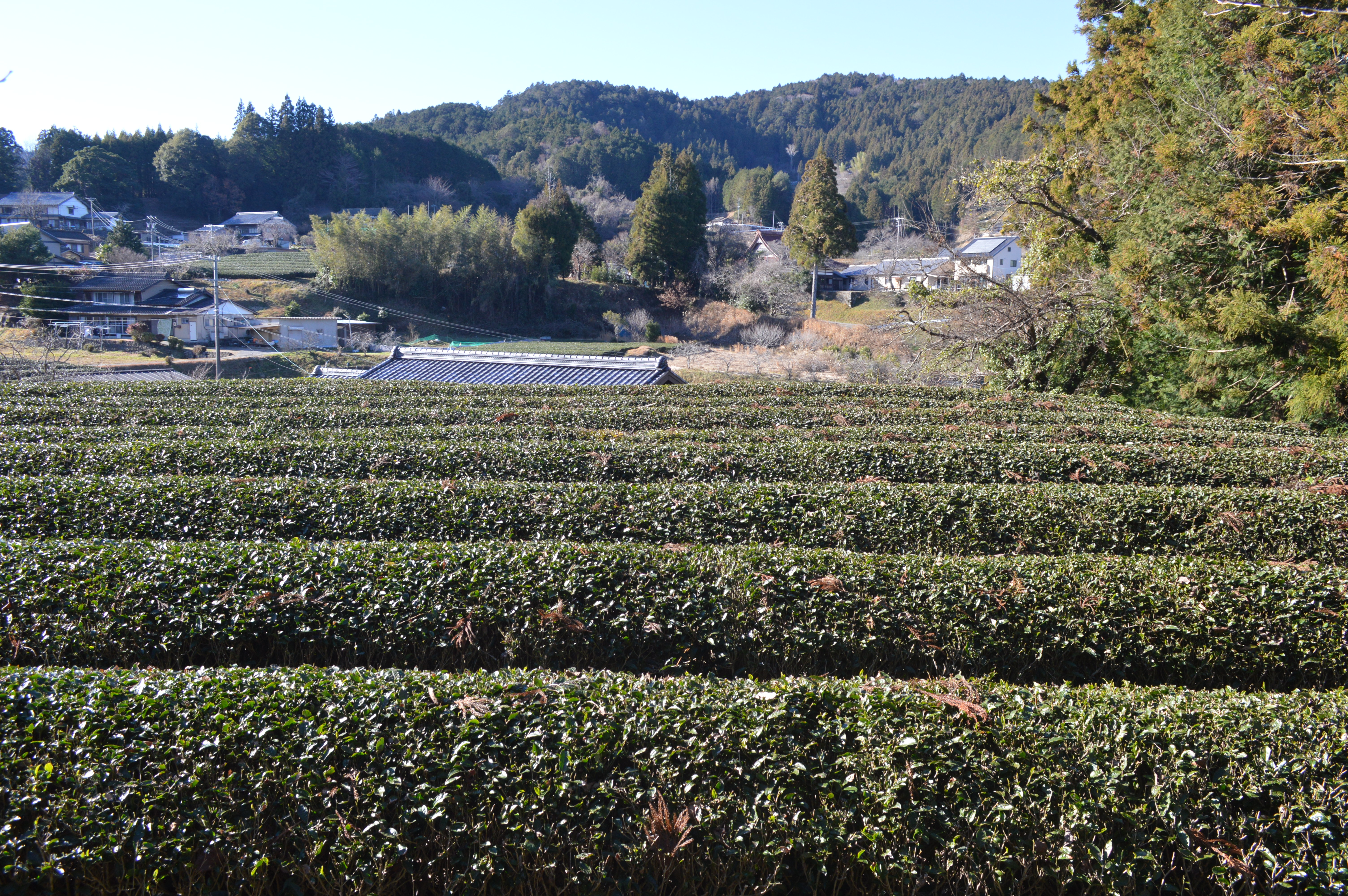 愛知県北設楽郡設楽町の田峯地区。手前は田峯茶の茶畑。